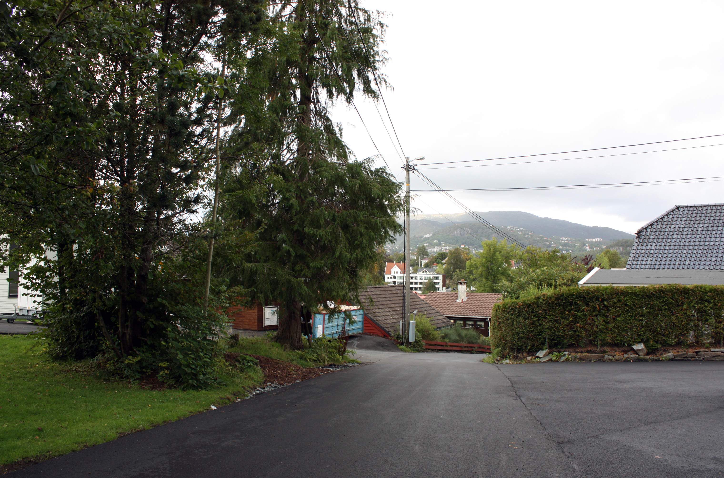 Hopsåsen, Fana, Bergen.